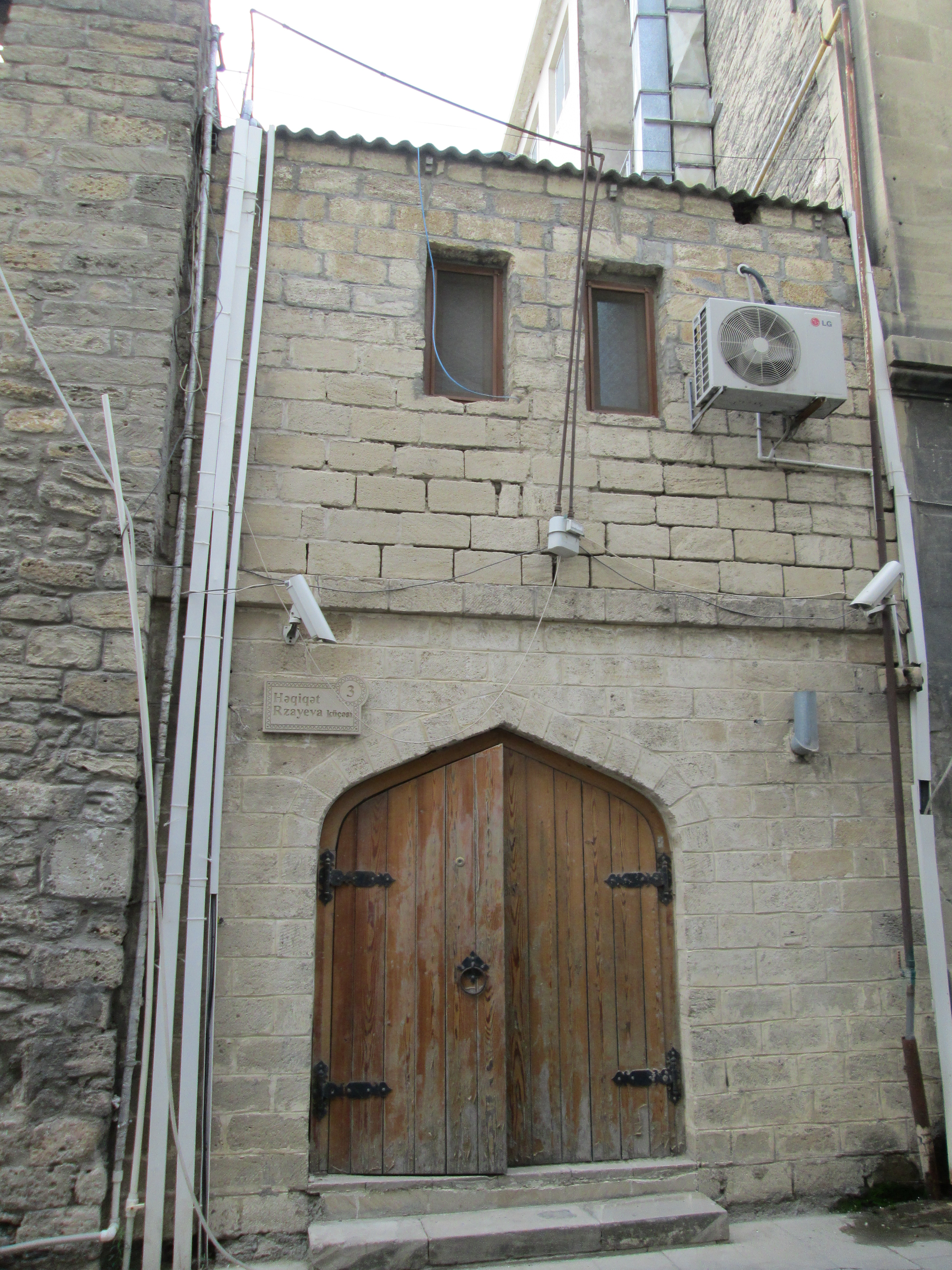 Həqiqət Rzayeva 3